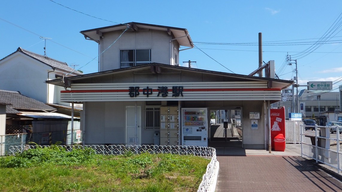 伊予鉄道 郡中港駅